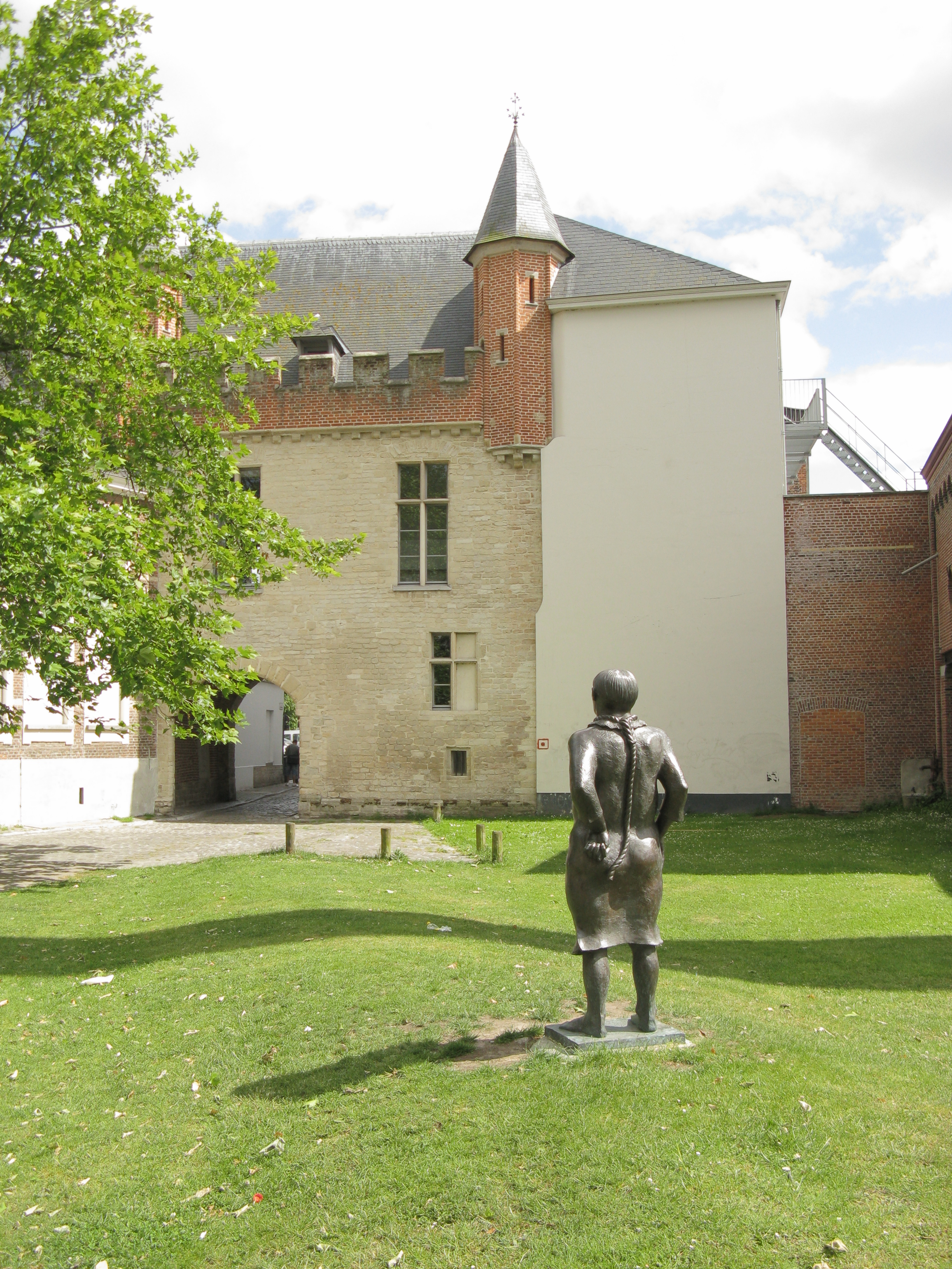 Standbeeld van stroppendrager in Hof Ten Walle in Gent.